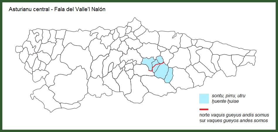 Asturianu central - Fala del Valle'l Nalón